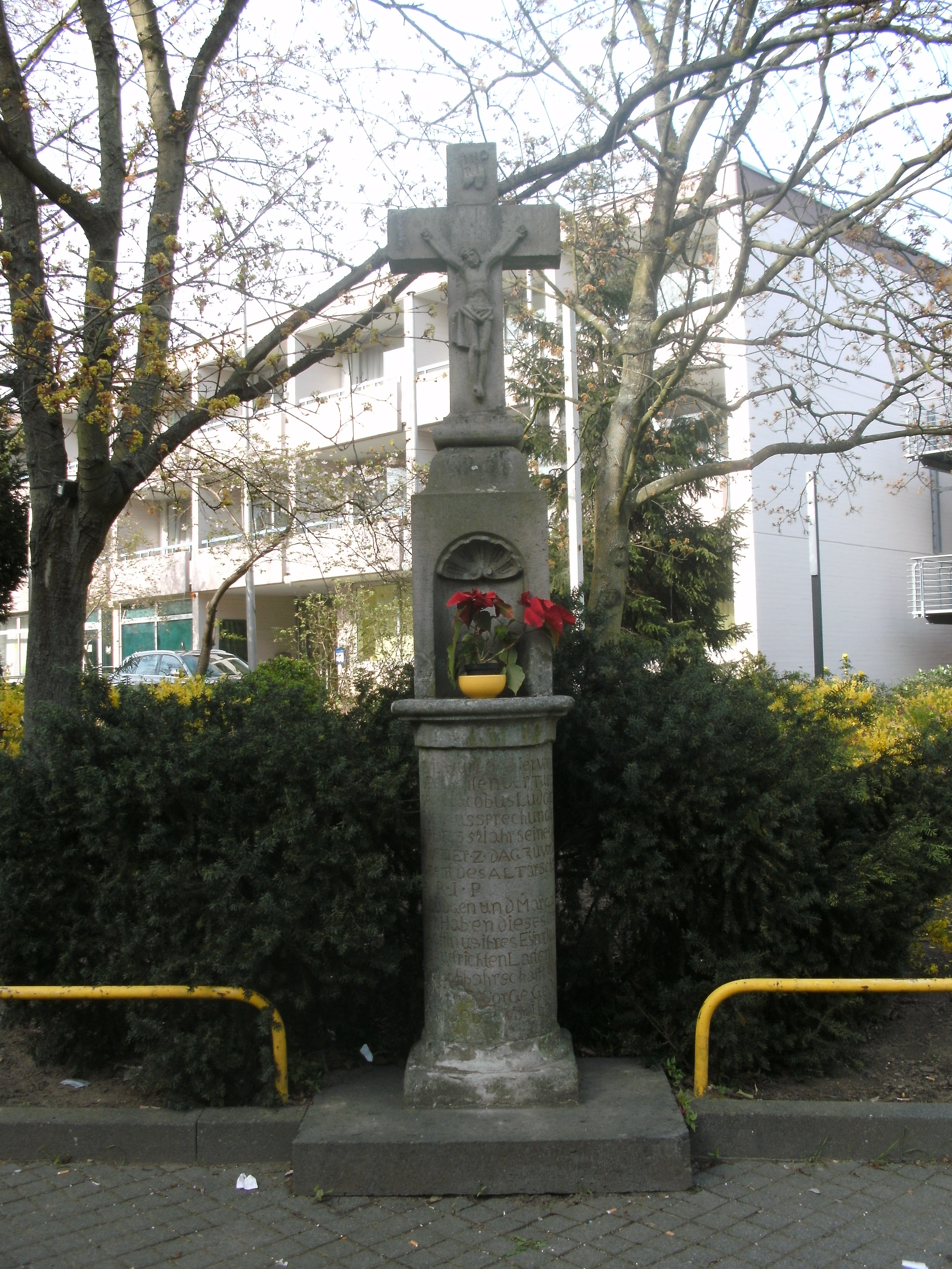 Wegekreuz Dellbrücker Hauptstr.